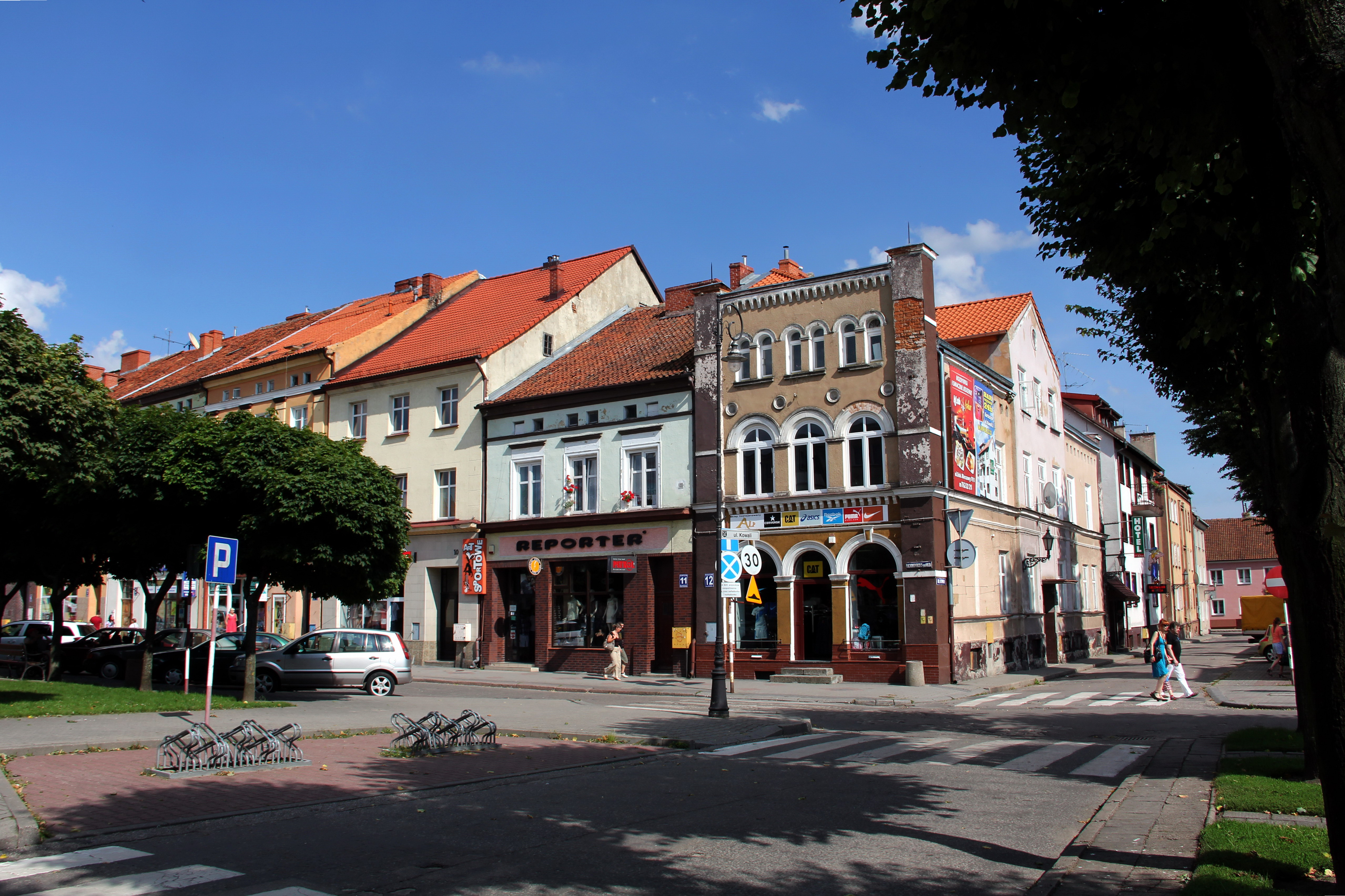 Na Placu Konstytucji 3 Maja w Bartoszycach.